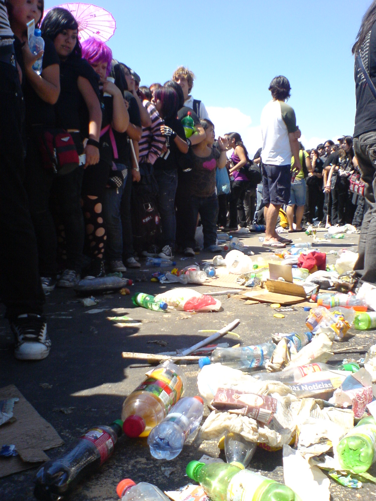 Basura en las afueras del Arena Santiago, para el concierto de My Chemical Romance en Santiago de Chile.